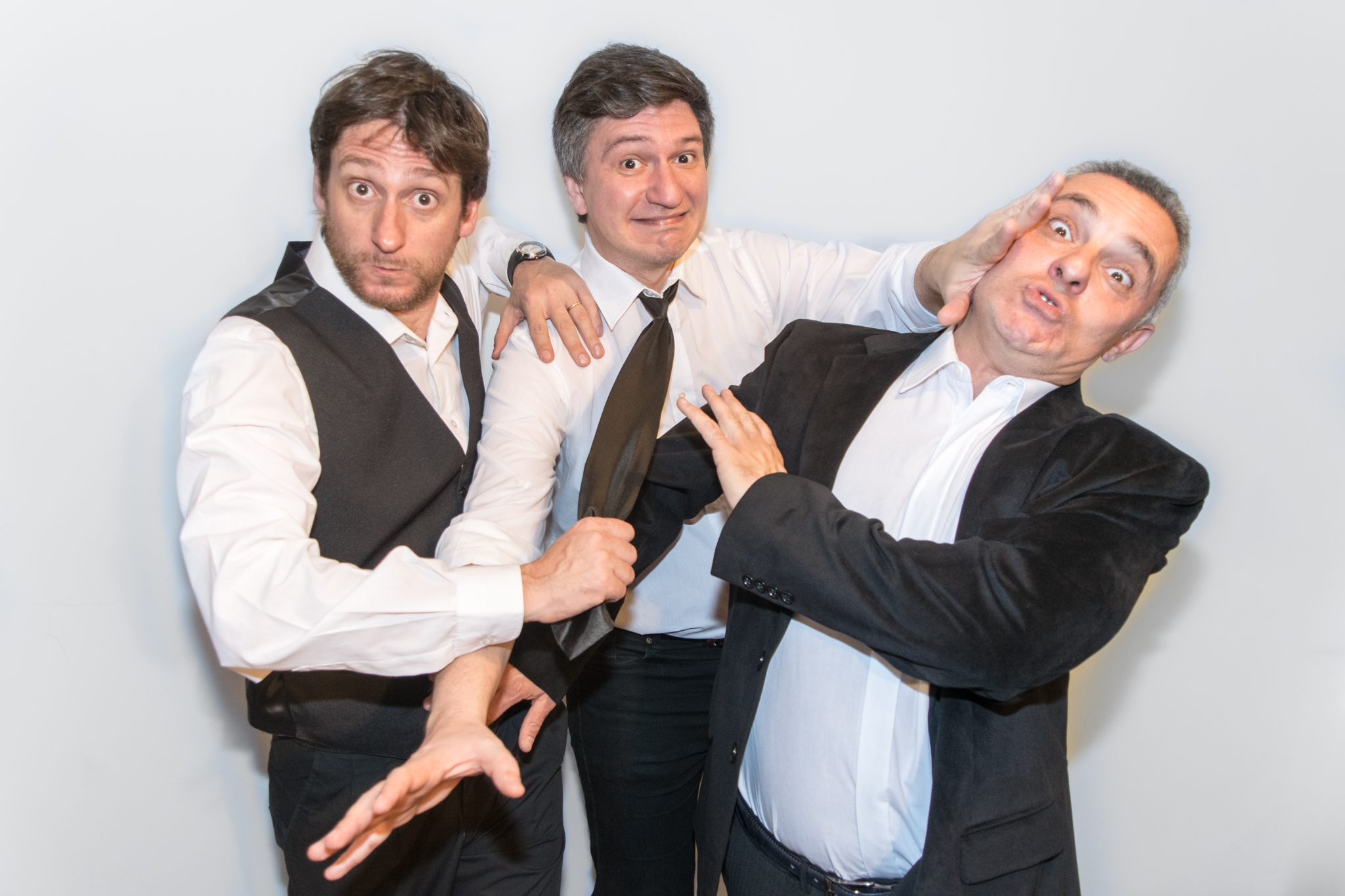 Marca Cañón 2016.